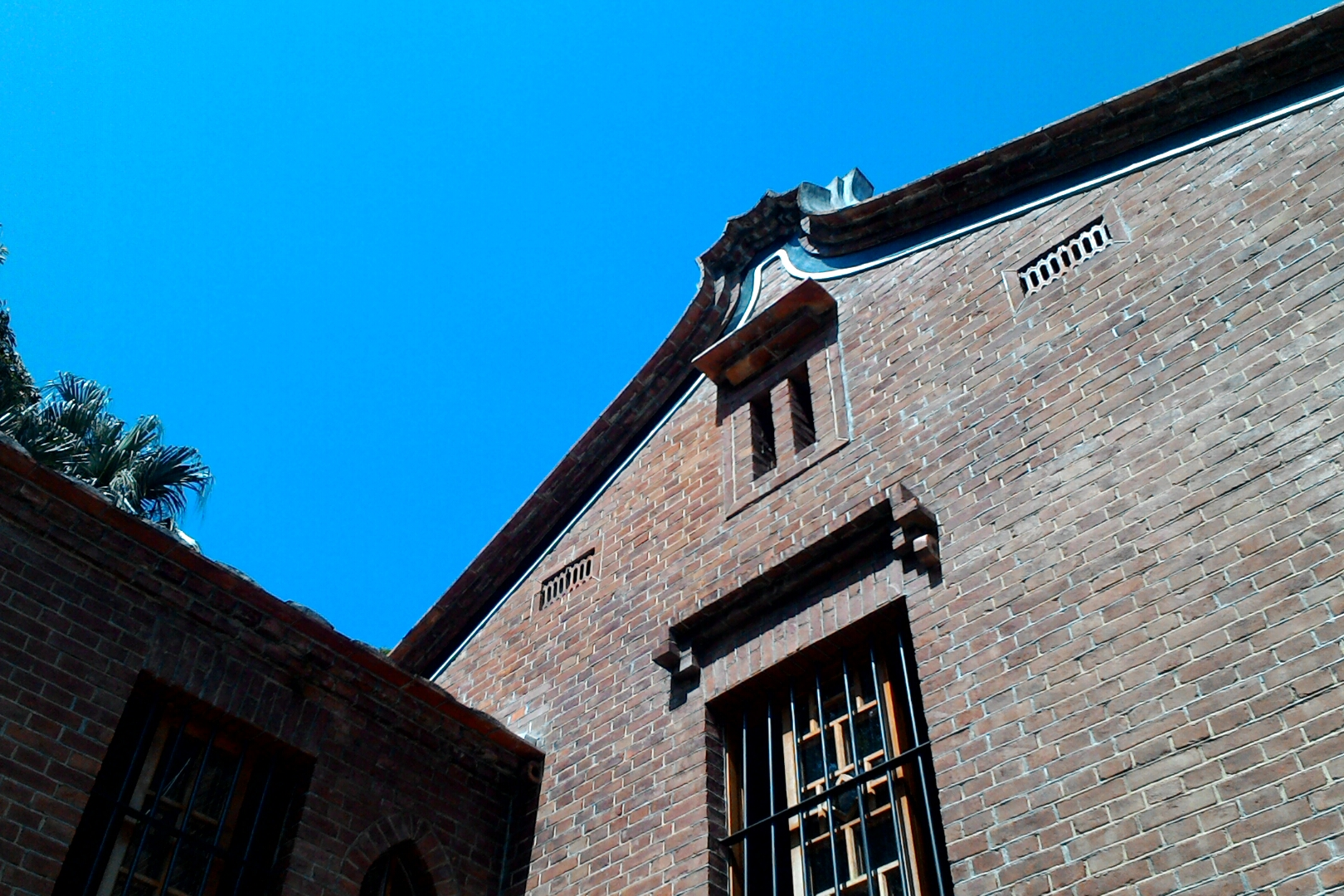 內湖郭氏古宅山牆,台北市內湖區紫陽次分區紫陽里